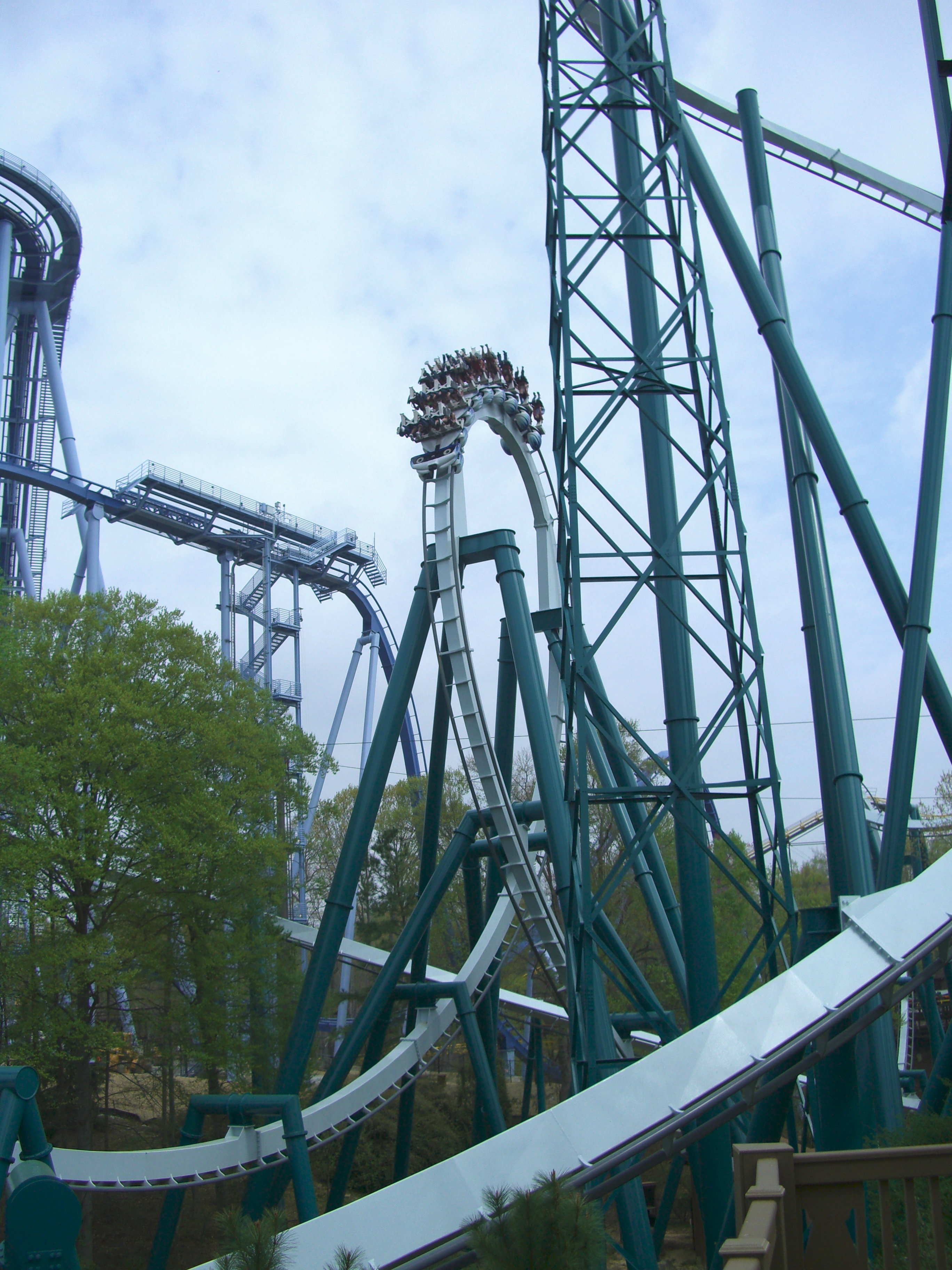 Alpengeist , montagnes russes à Busch Gardens Europe